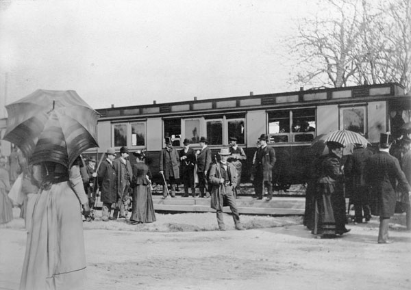 Djursholmståg